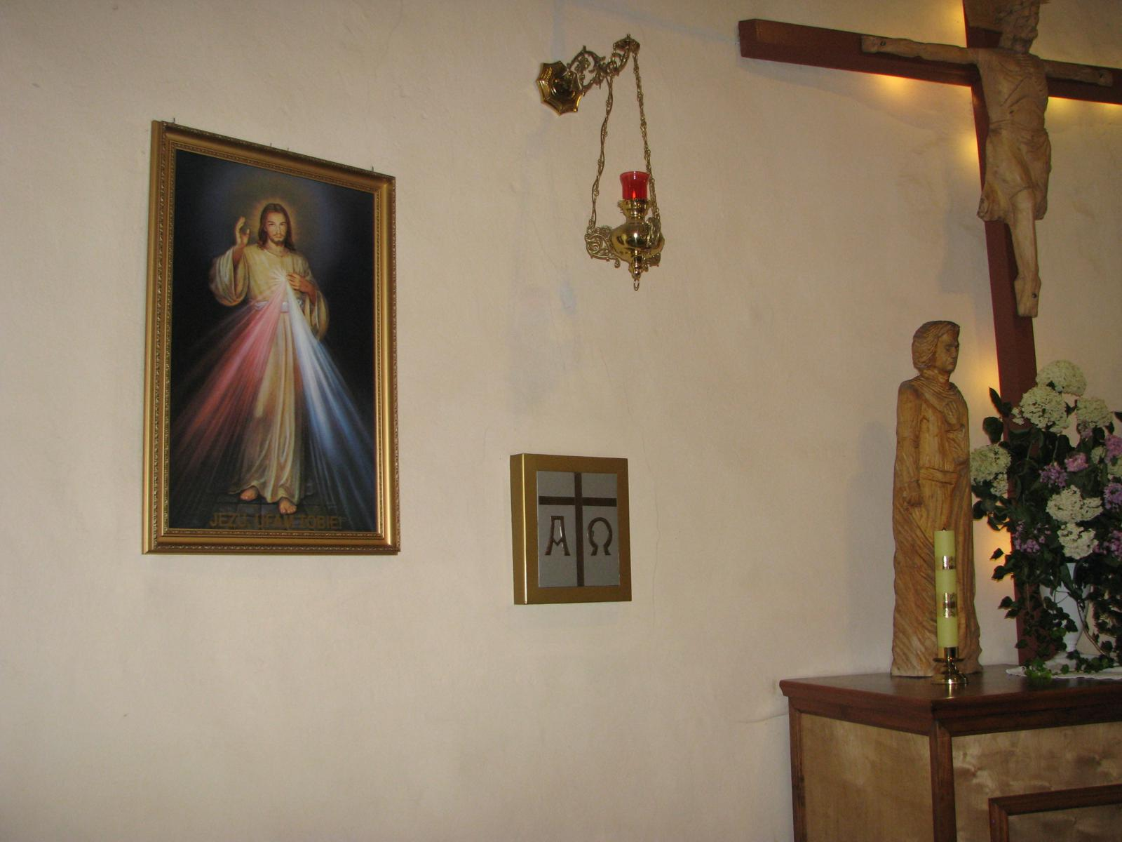 Kościół w Wojcieszycach. Sakramentarium.